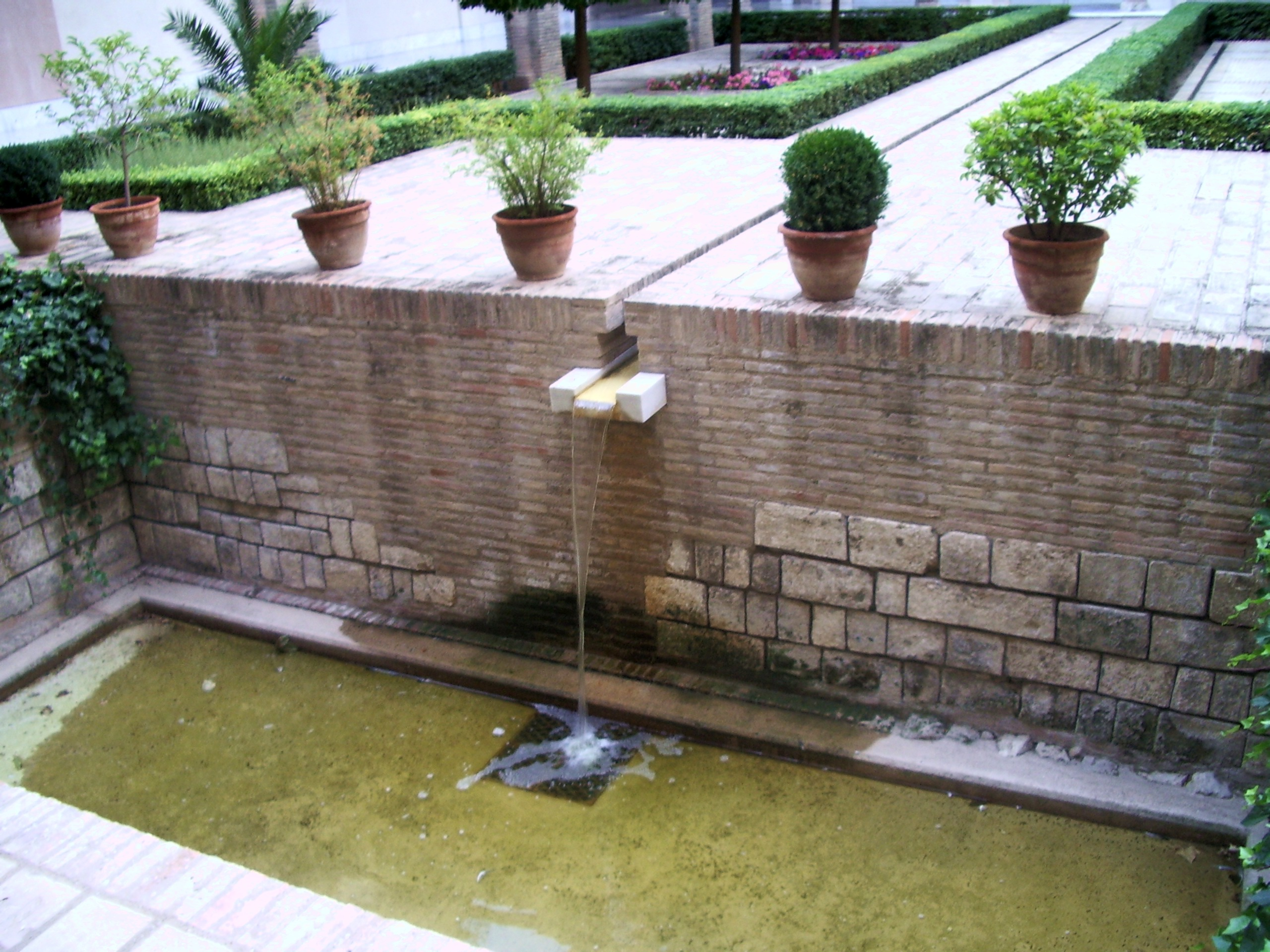 Aljibe sur del Palacio de la Aljafería